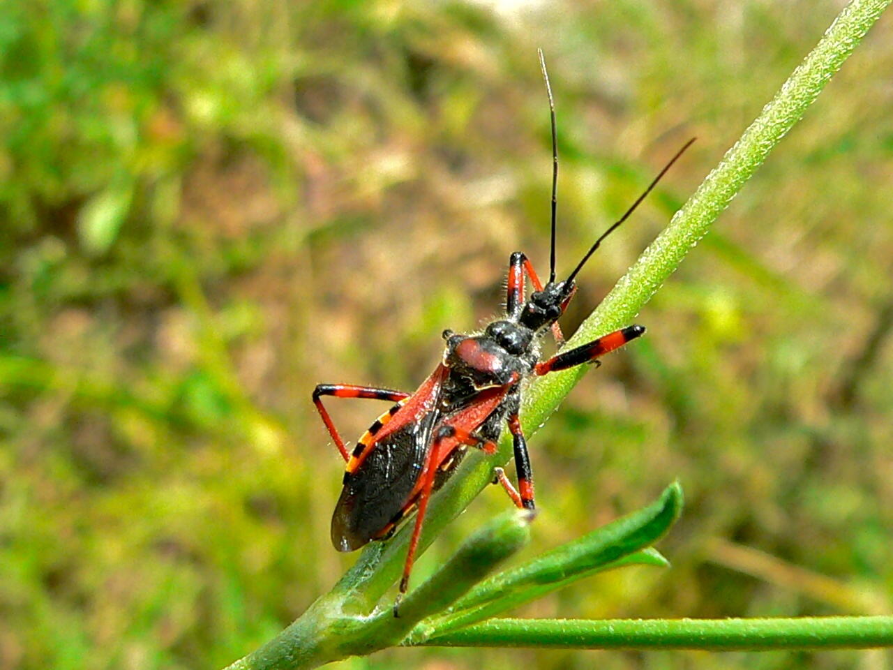 Espaze, Camplong, Hérault, FRANCE